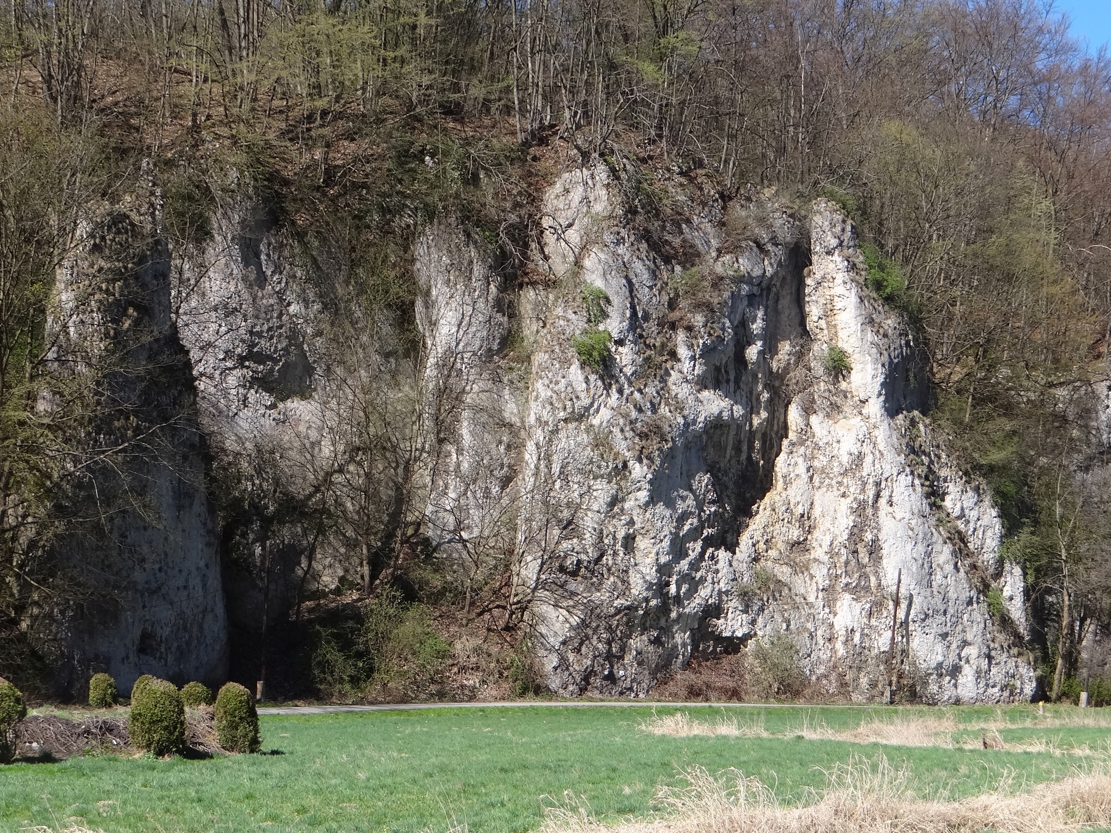 Skała Koźniowa w Ojcowskim Parku Narodowym